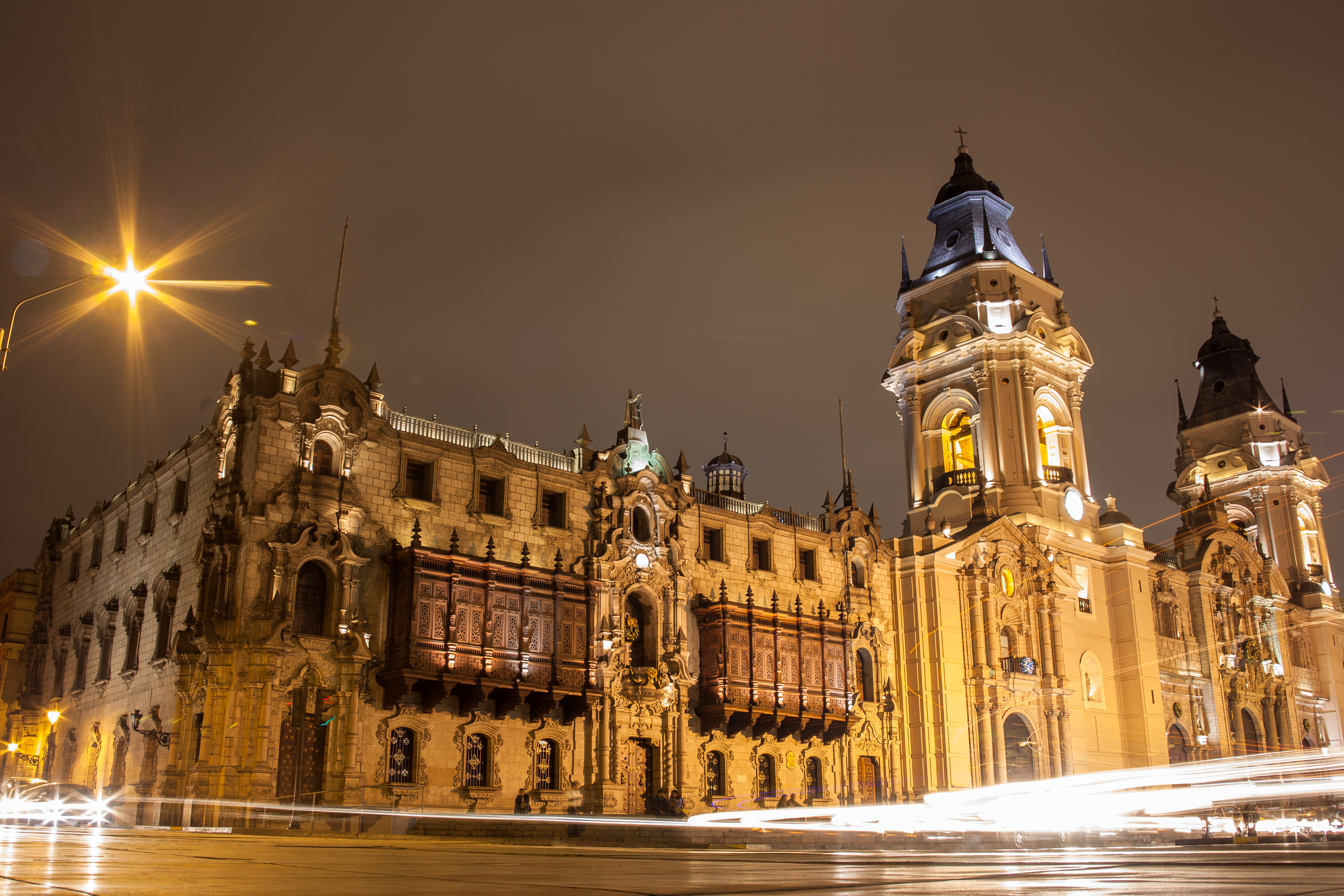 Aufnahme von der Catedral de Lima bei Nacht. ursprüngliche 5k Auflösung.